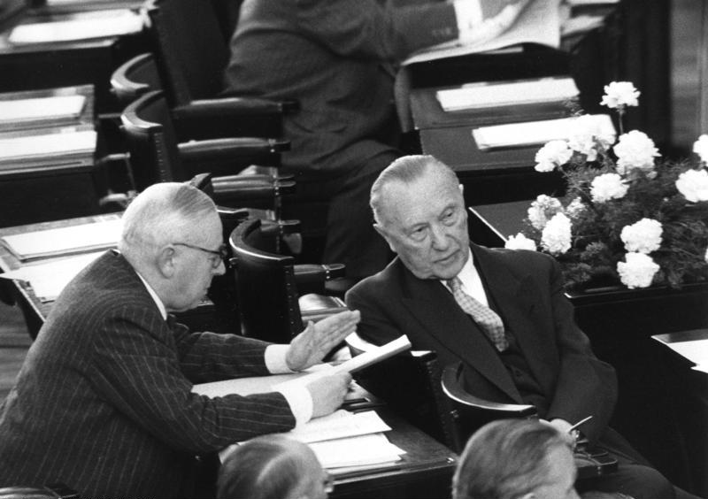 Europa-Debatte Robert Pferdmenges, Bankier geb. 27.3.1890, gest. 18.9.1962 1950 - 1962 Mitglied des Bundestages 1961 Alterspräsident